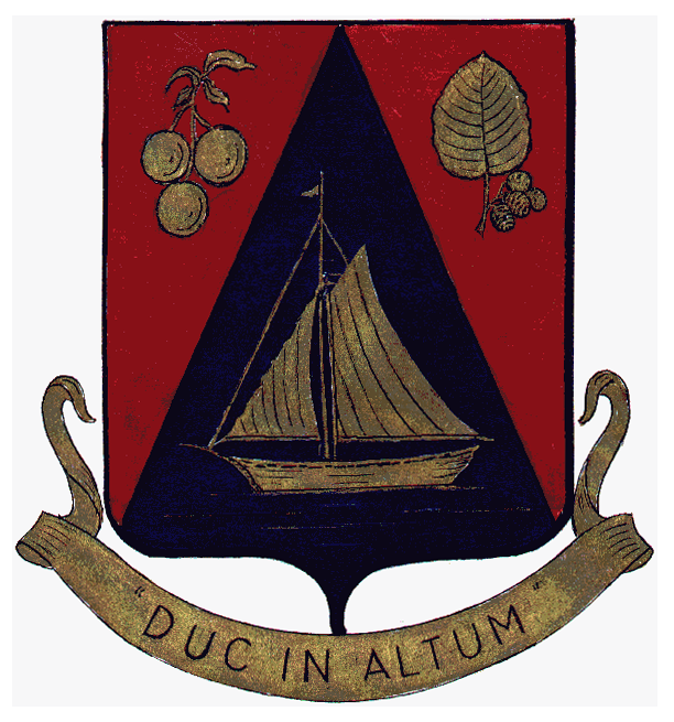 Armoiries de la famille St-Pierre